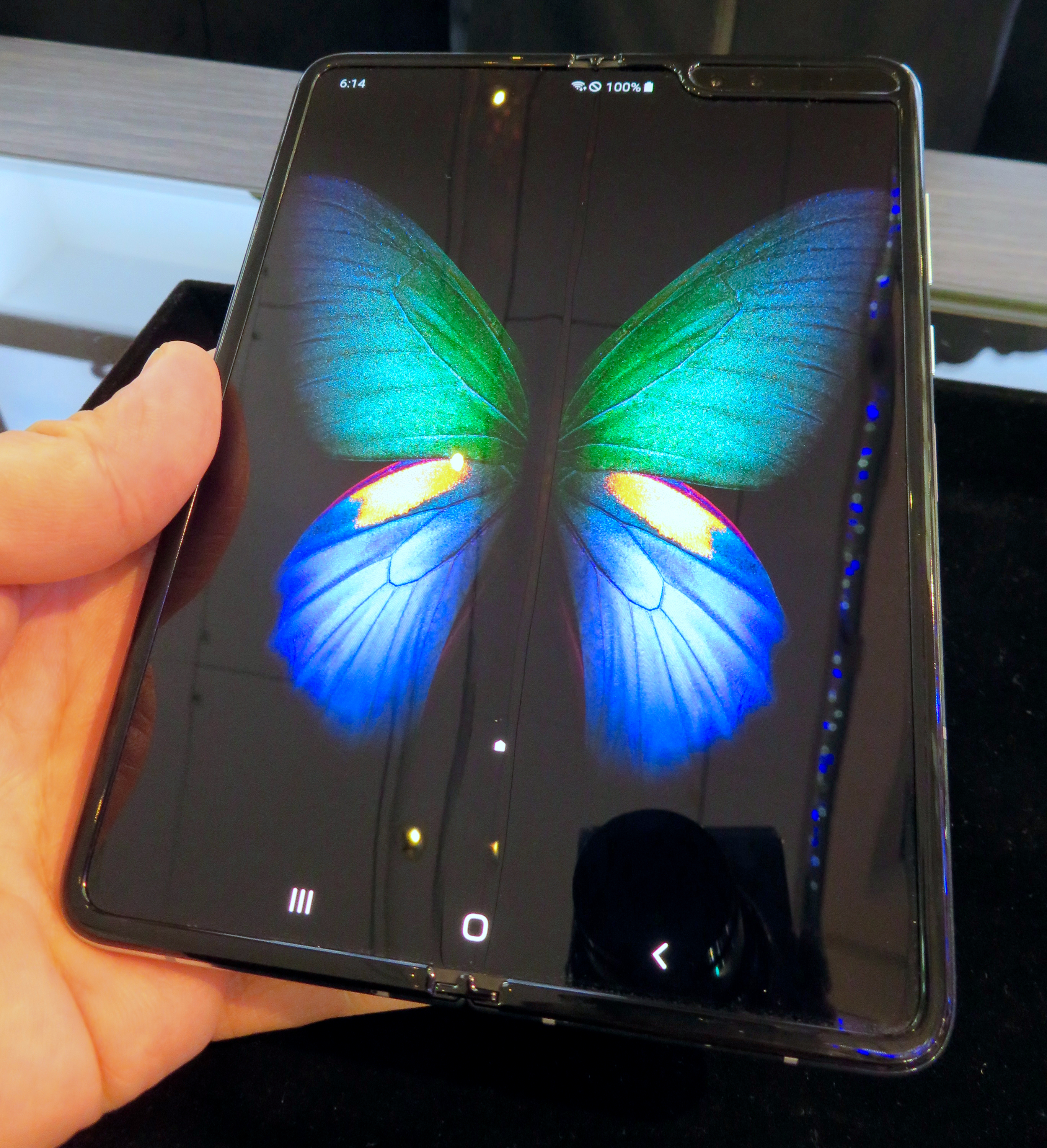 Samsungの折りたたみスマートフォン「Galaxy Fold」。